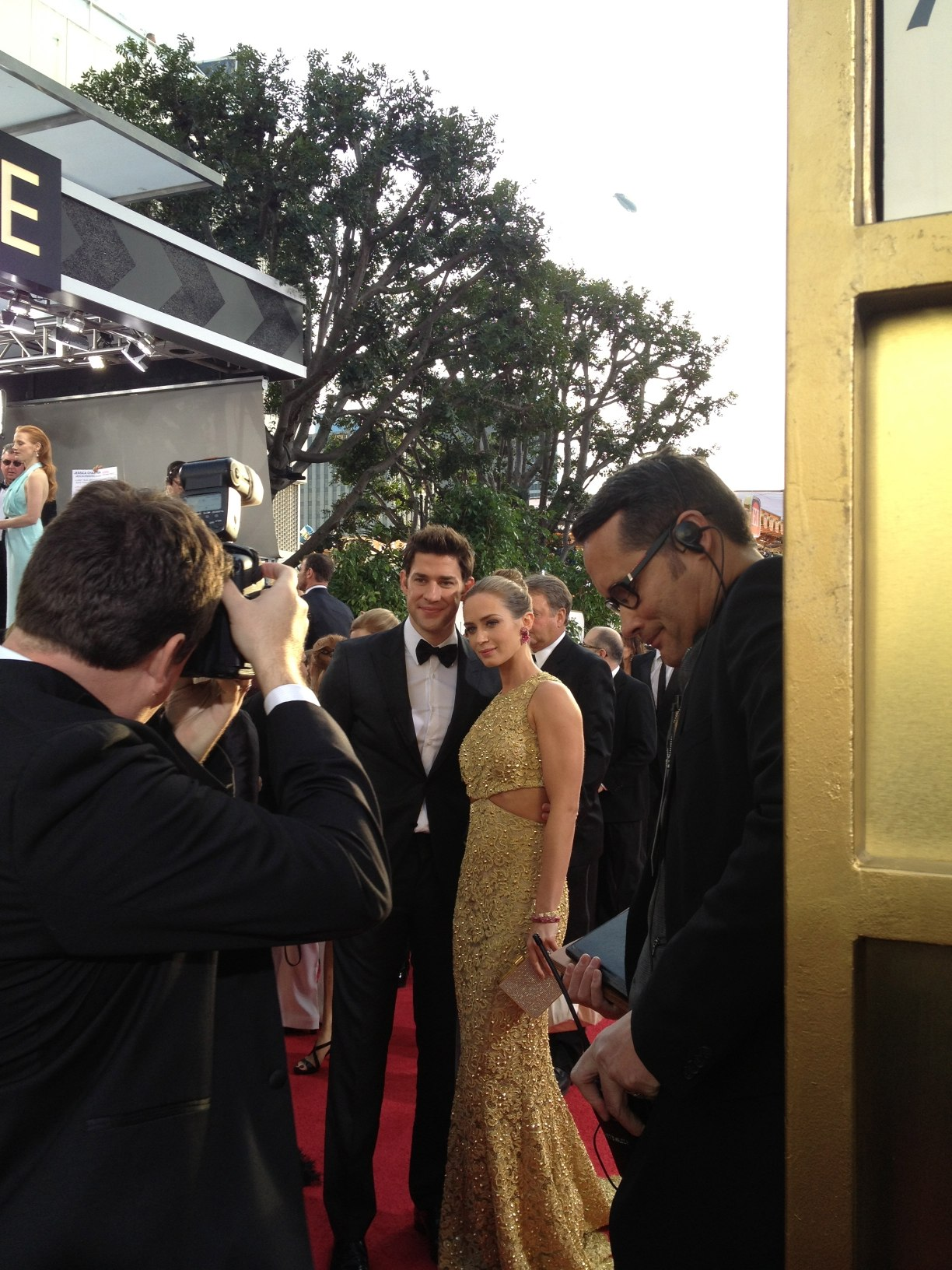 Emily Blunt and John Krasinski in 2013 Golden Globe Awards.